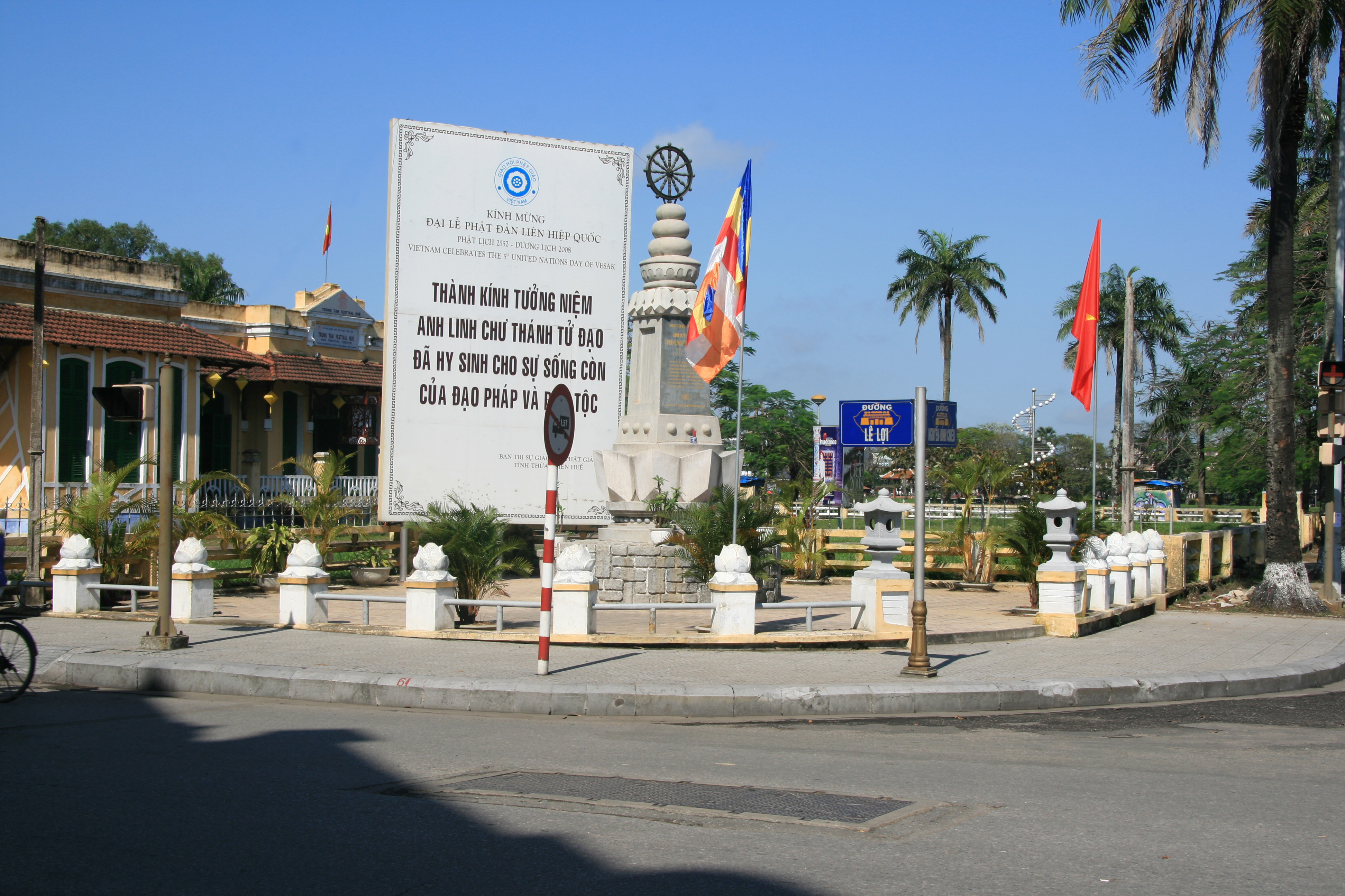 Đài kỉ niệm thánh tử đạo, sự kiện 1963 tại Huế, Việt Nam. Nhà phía sau, trước đây là Đài phát thanh Huế.